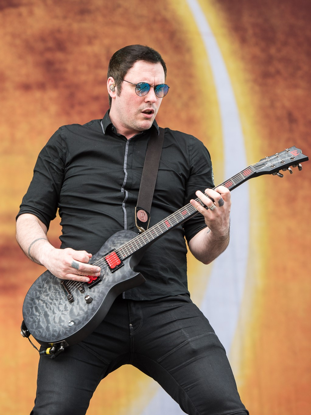 ARGO-Konzerte,Benjamin Burnley,Breaking Benjamin,Festival,Konzert,Livekonzert,Livemusik,Musik,RiP,Rock im Park 2016,Seat Zeppelin Stage